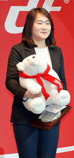 제17회 코카콜라 체육대상 시상식